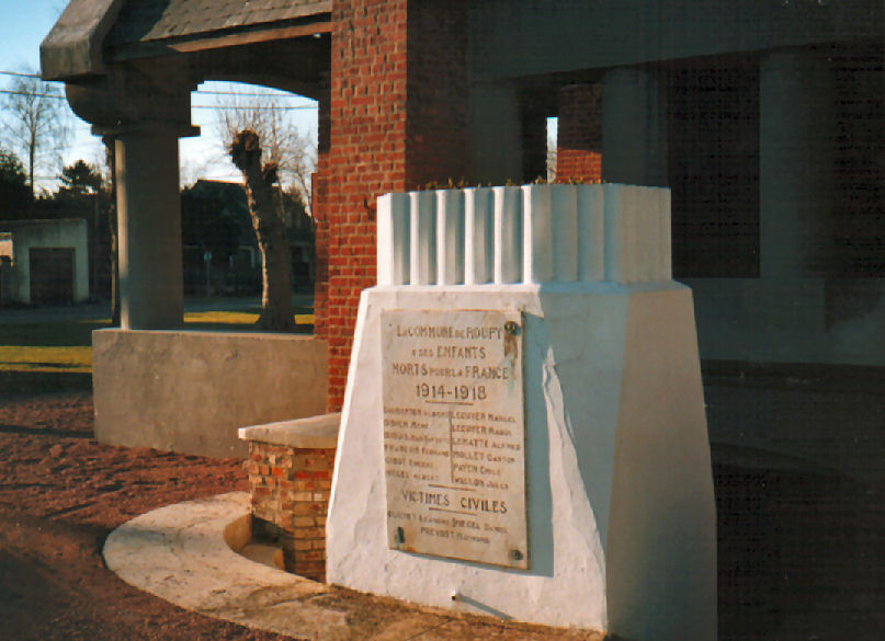 Eglise de Roupy (02) - Monument aux morts - Photo par moi-même